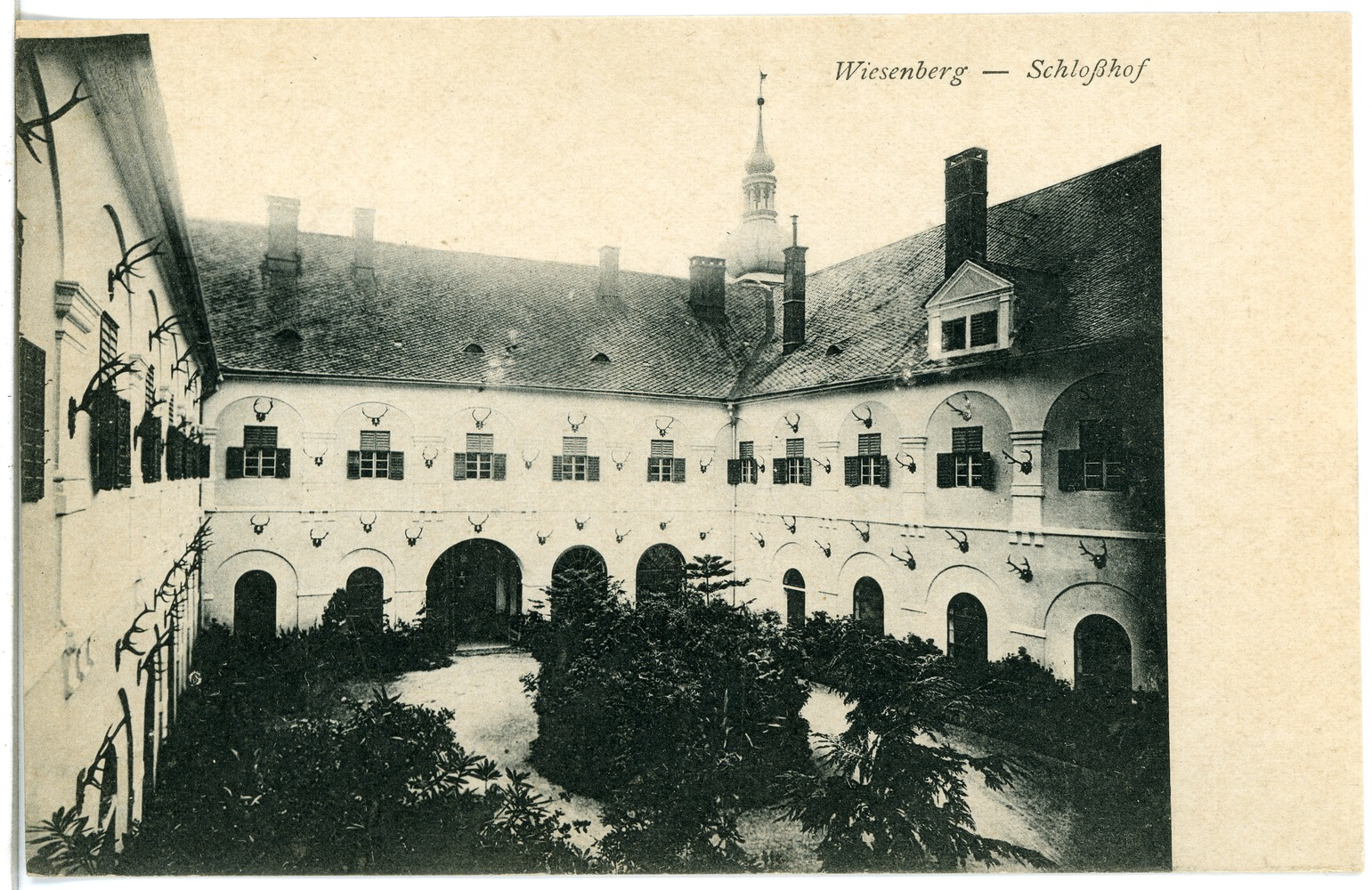 Wiesenberg; Schloßhof This postcard is from publisher Brück & Sohn in Meißen ( postcard has a unique number 21808 and is available in a higher resolution at the publisher. This images was uploaded in a cooperation project between Wikipedians and the publisher.